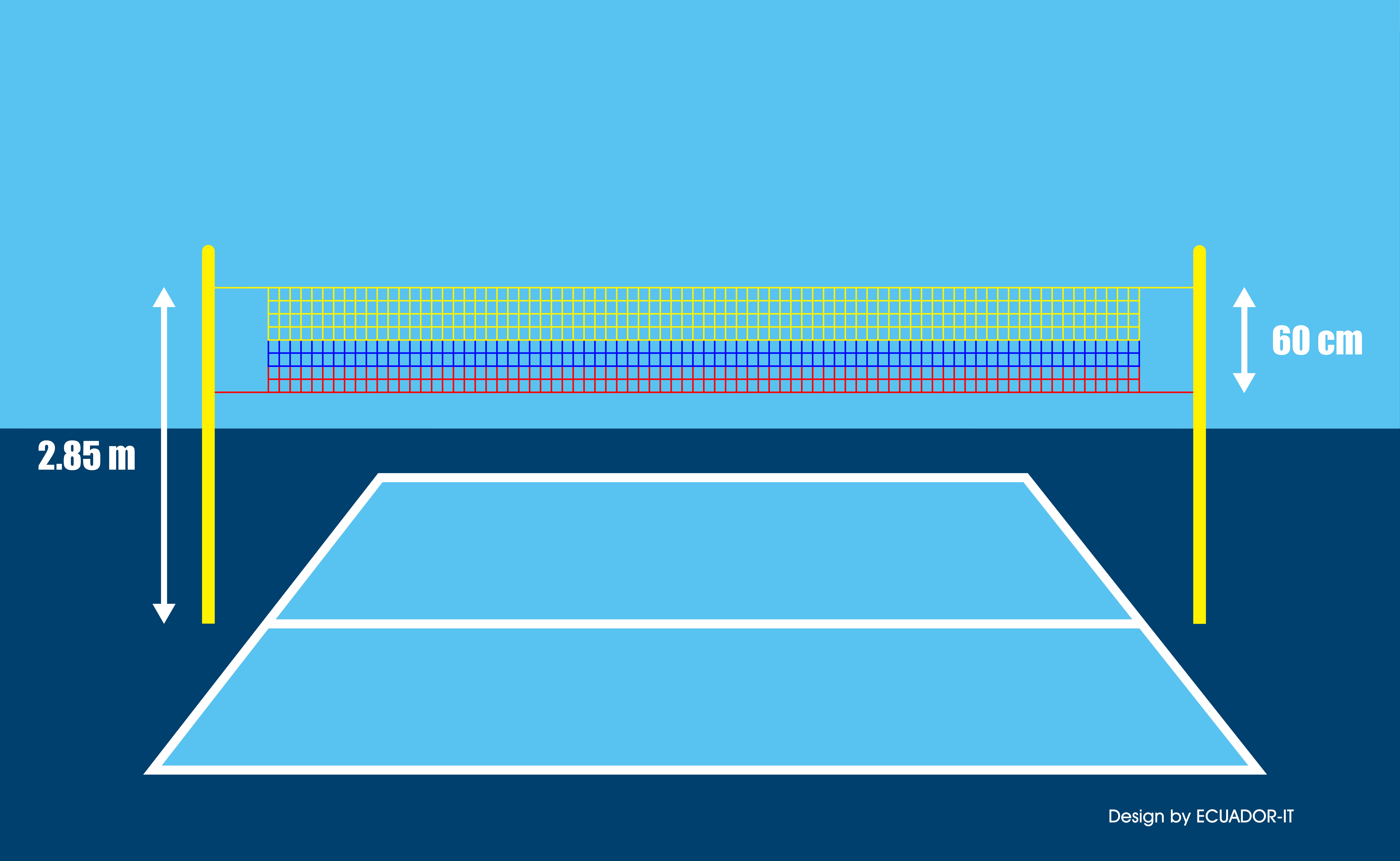 Dimensiones Red